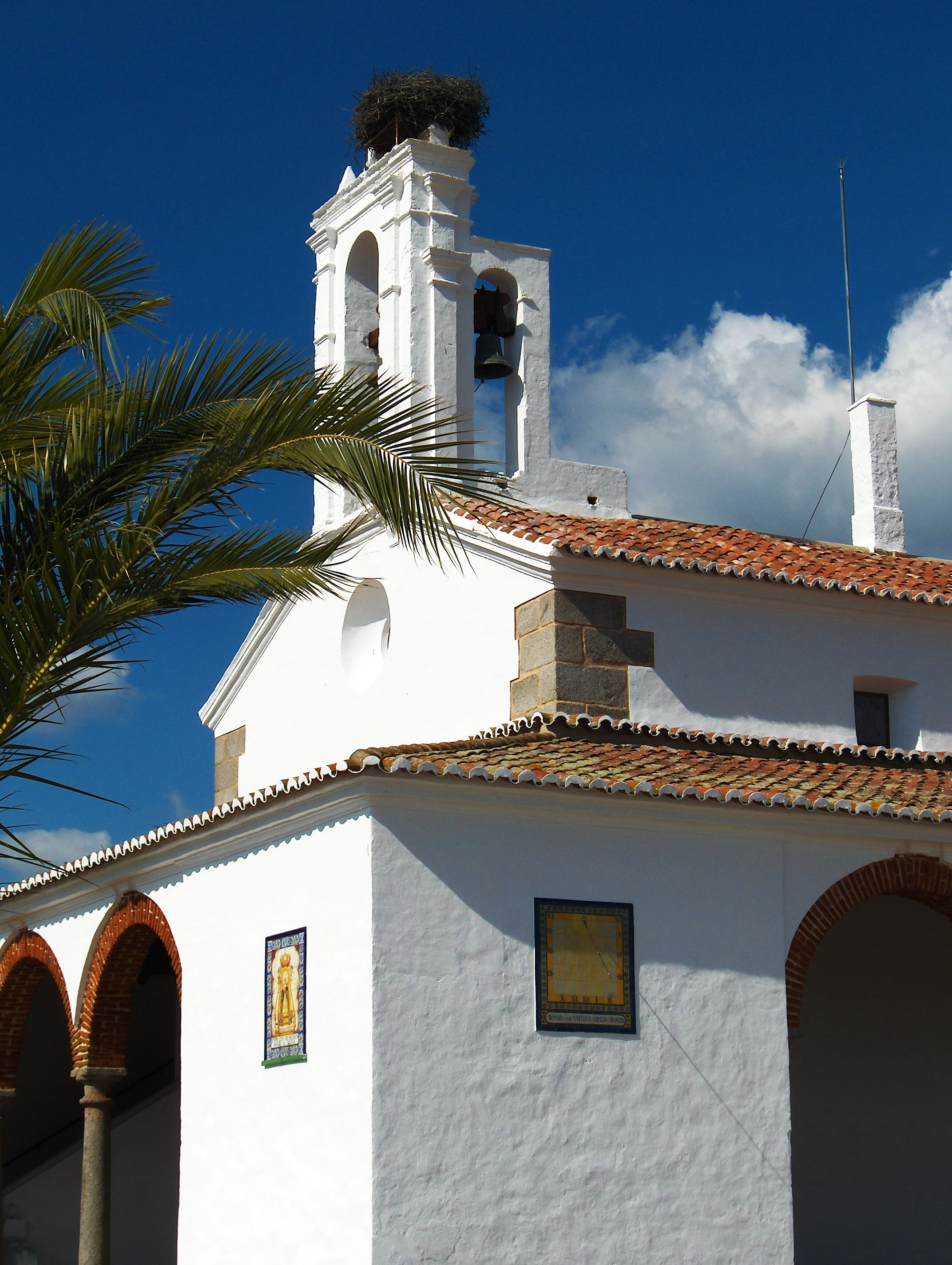 torre ermita